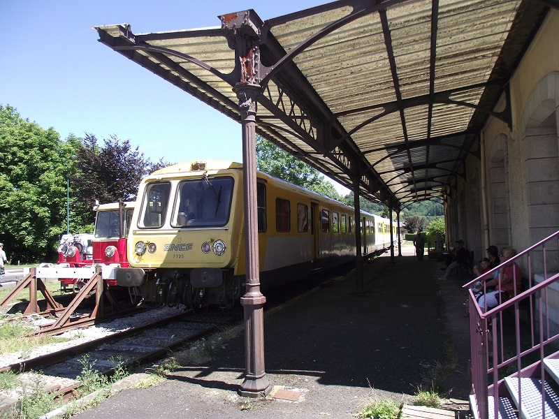 Gentiane Express en gare de Riom-ès-Montagne